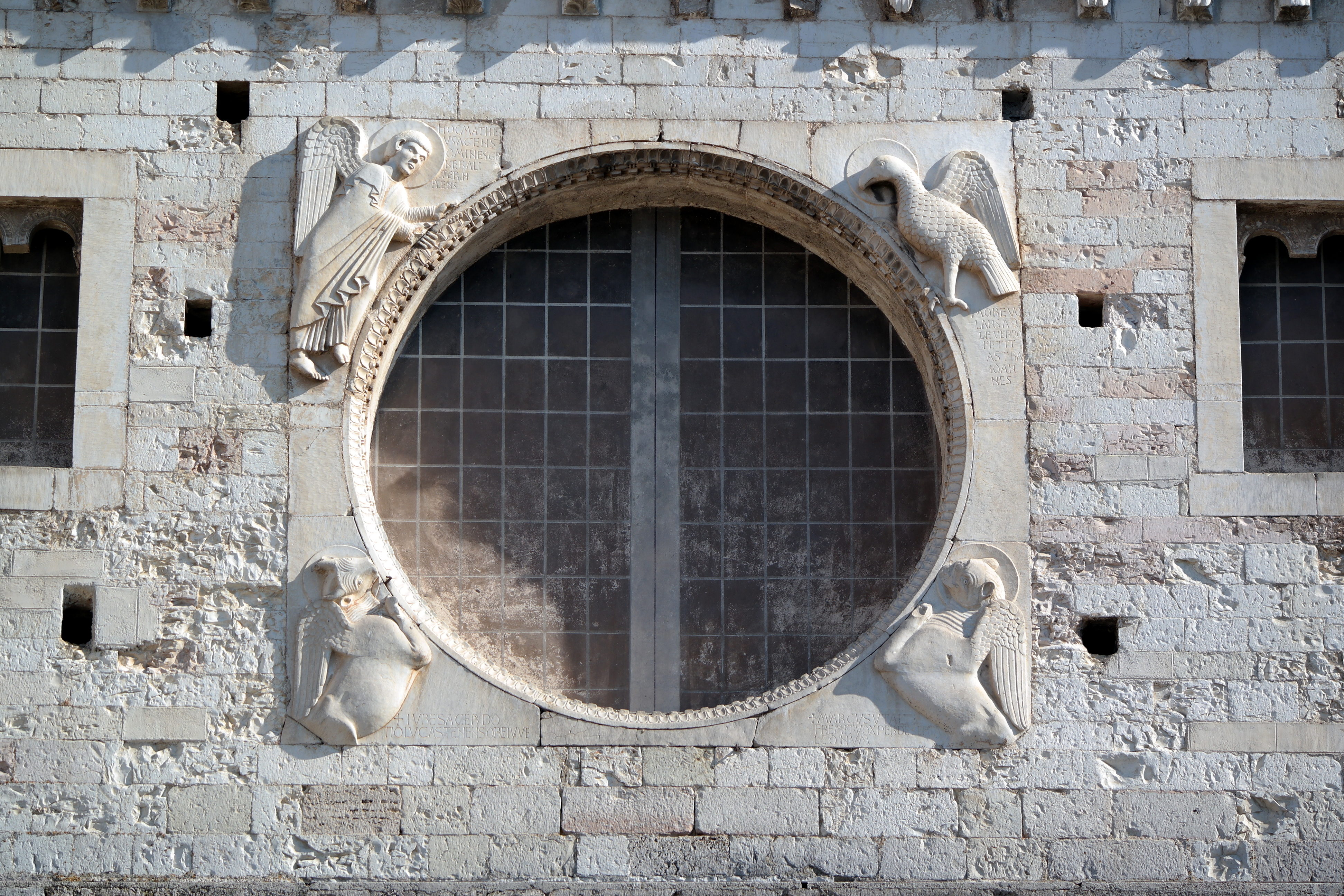 Ciò che resta del rosone della Chiesa di San Ponziano a Spoleto